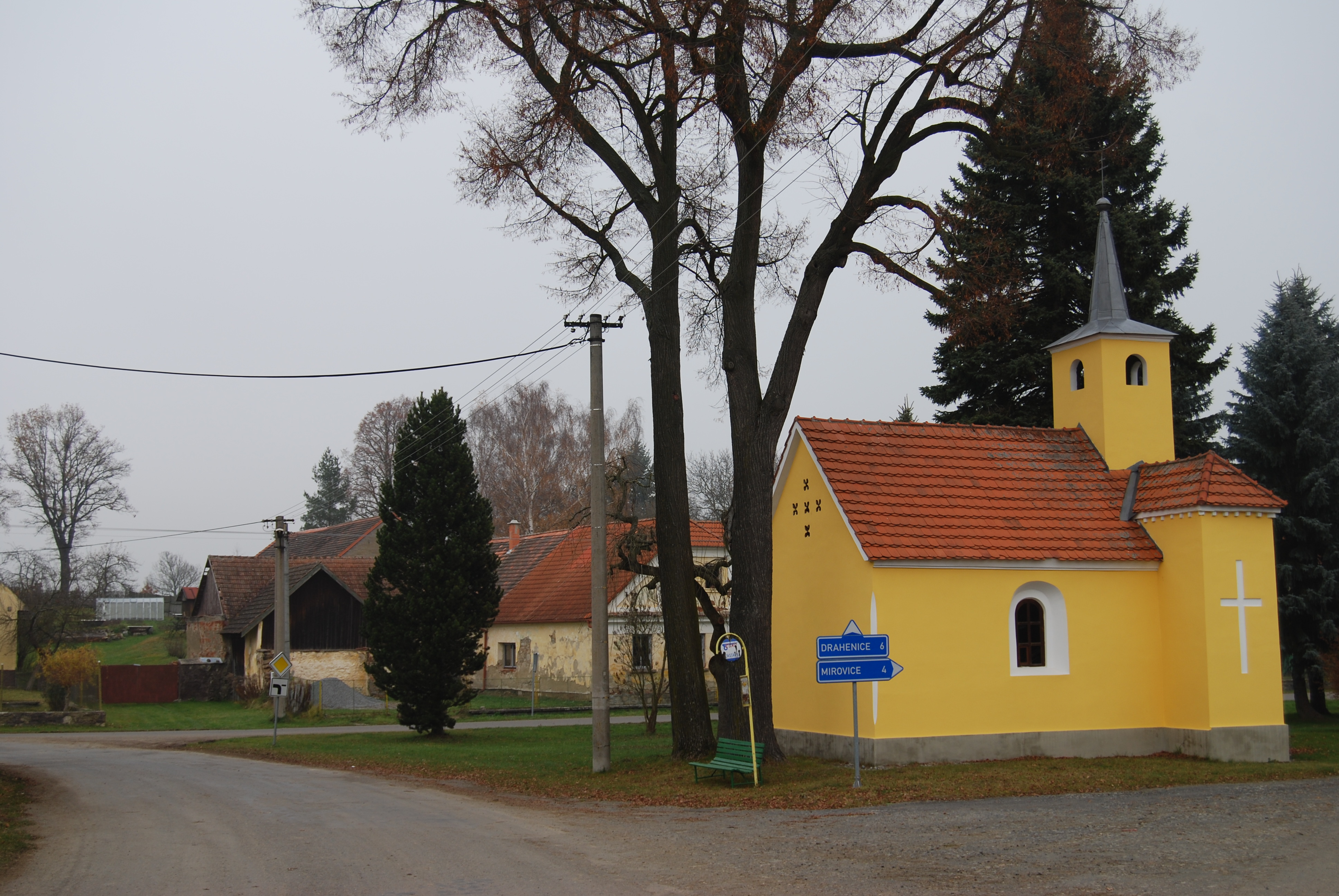 Návesní kaple. Mišovice je obec ležící v jižních Čechách v okrese Písek. Česká republika.